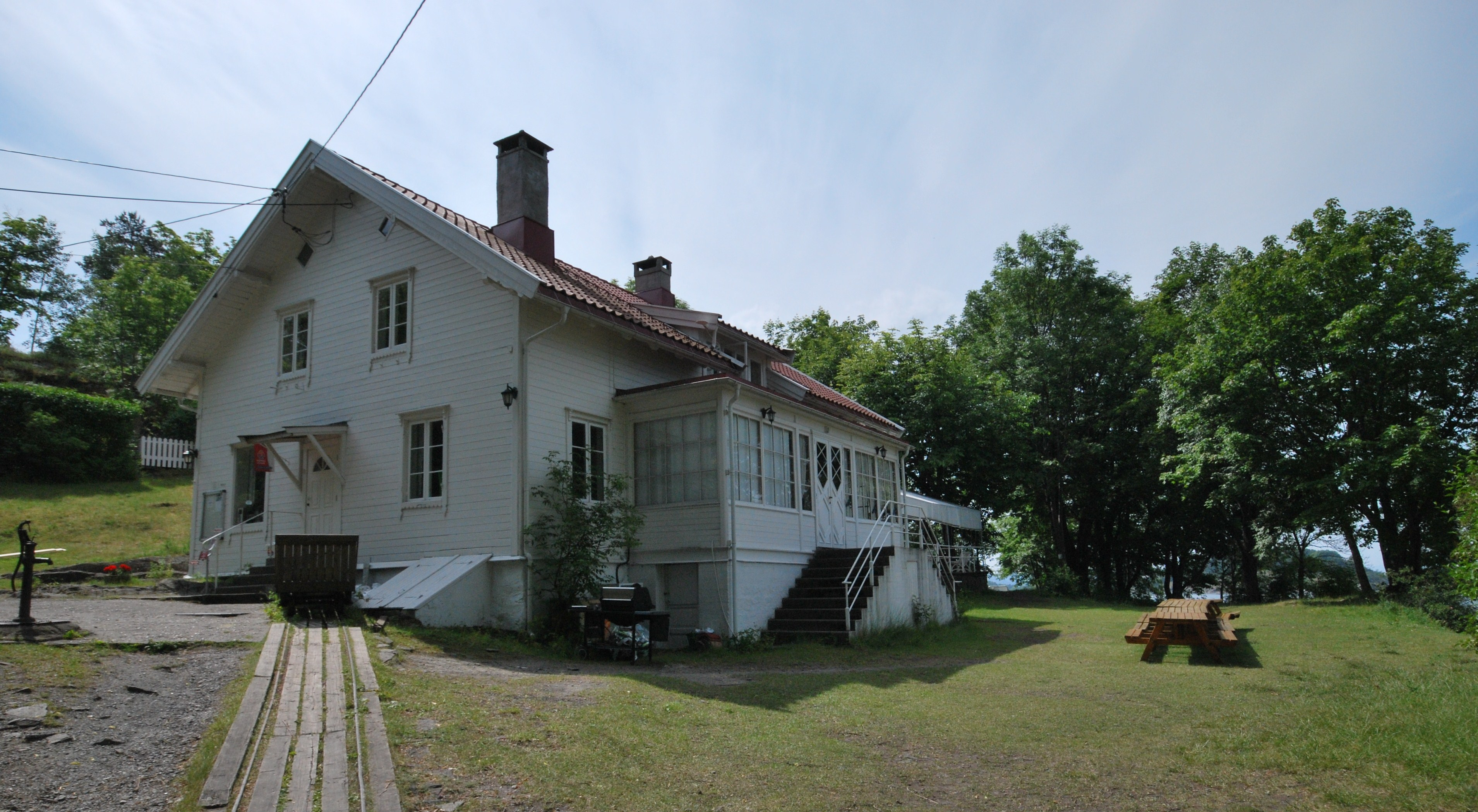 Velhuset på Bleikøya, Oslo. Tidligere sanatorium for barn med skrofulose (en form for tuberkulose)